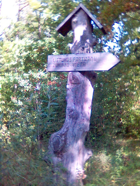 Partizanų žuvimo vietos rodyklė Pašušvio miške, Kėdainių raj.